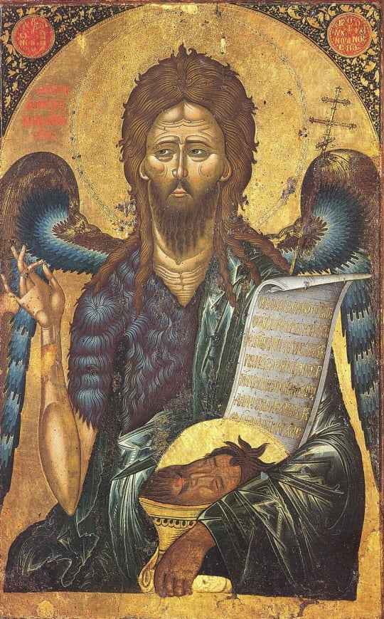 Shën Joan Pagëzori, Pararendësi. Vepër e Onufrit, shek. XVI, Tempera në dru.